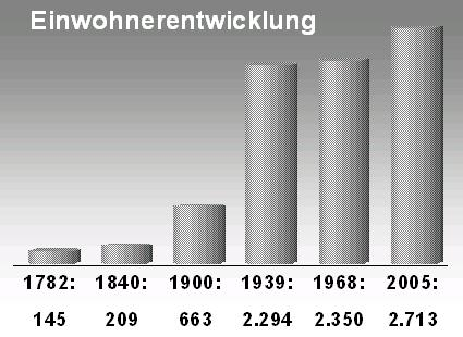 Einwohnerentwicklung von Gerwisch (Sachsen-Anhalt)